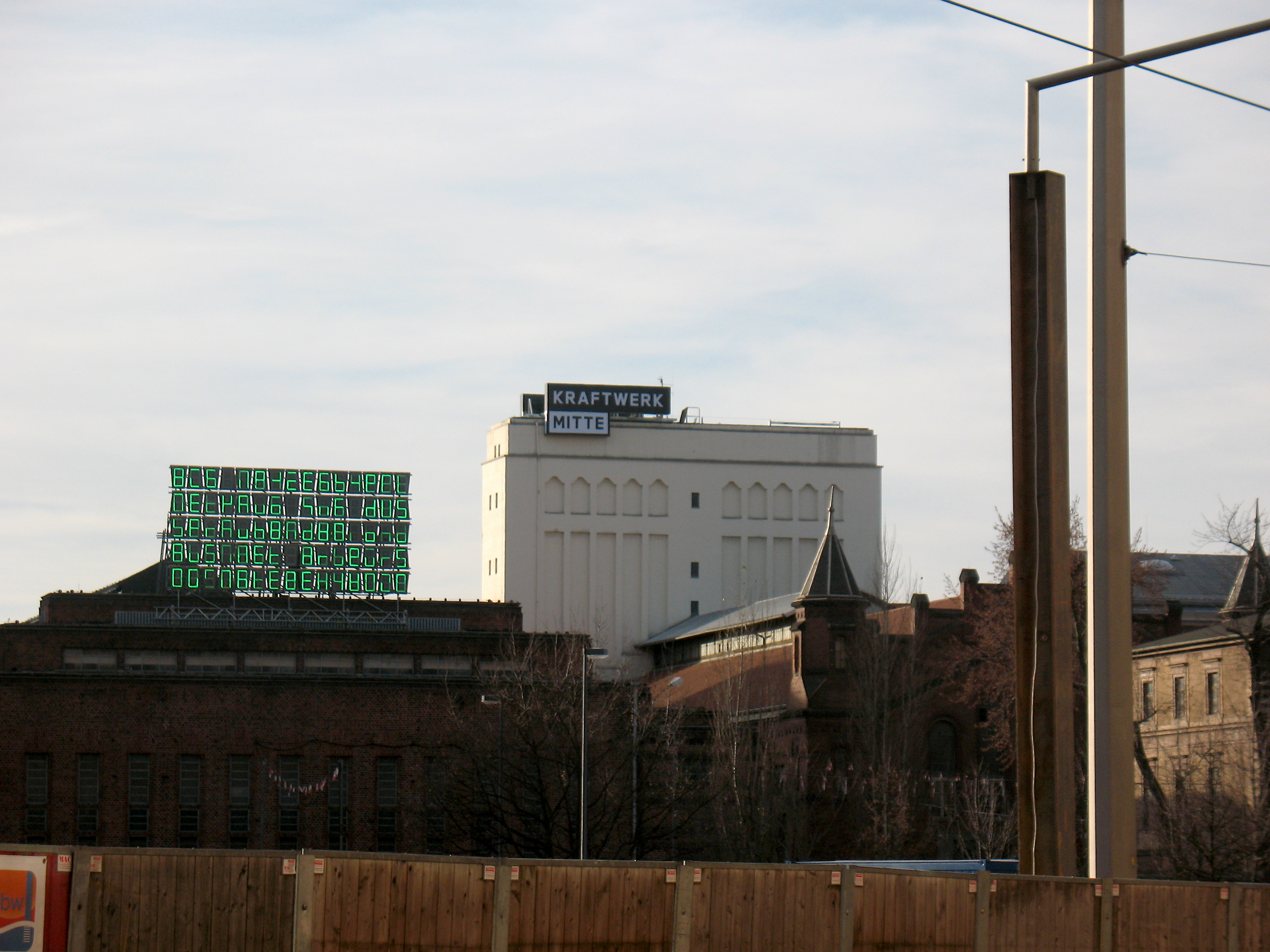 + 00000000001_Image_Kraftwerk Mitte_Dresden